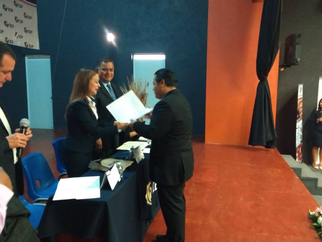 Entrega de Actas de Titulación de Universidad ICEP Colima